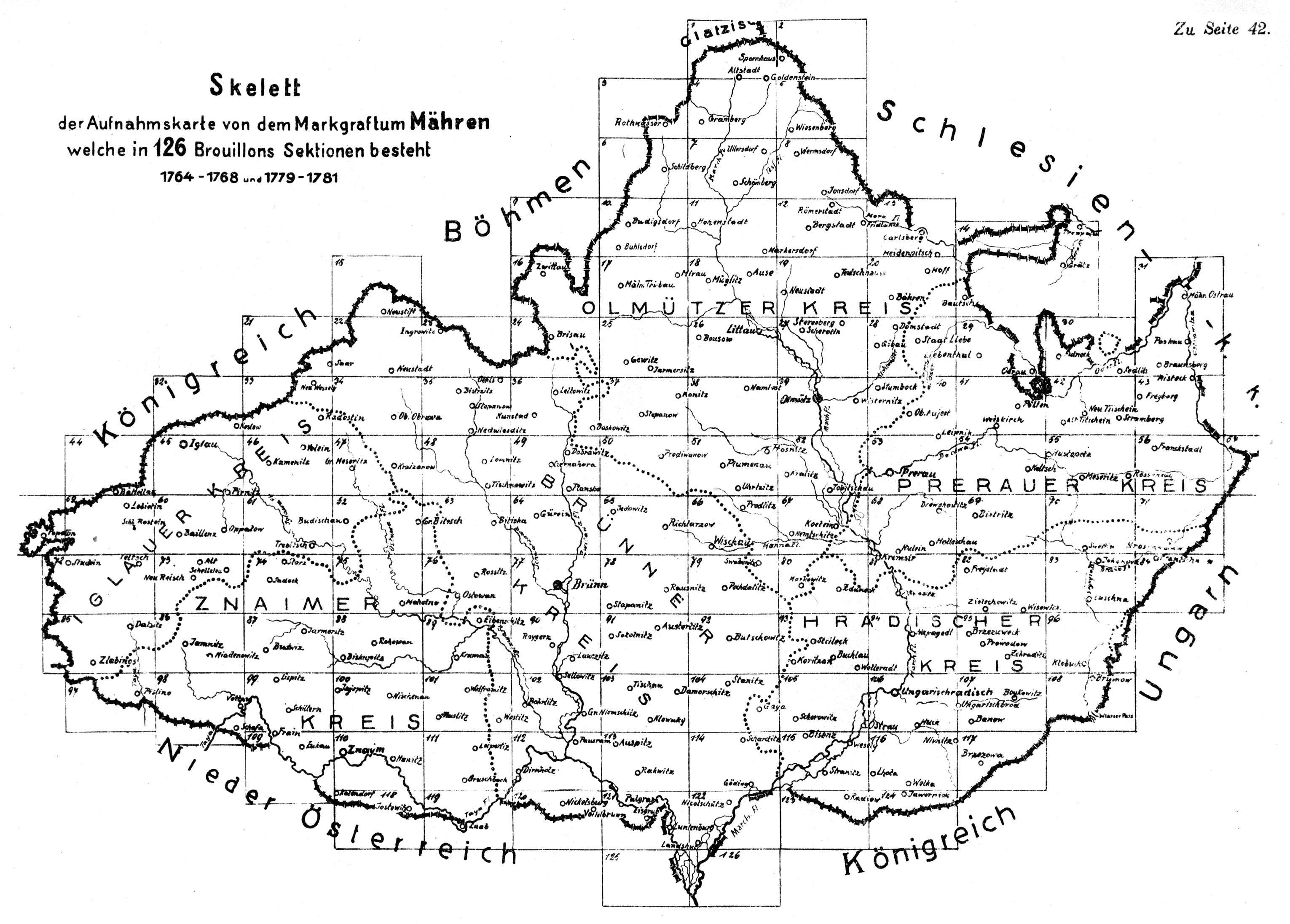 Harta generală a Moraviei în hărţile iozefine, executată între anii 1764-68 şi 1779-81.